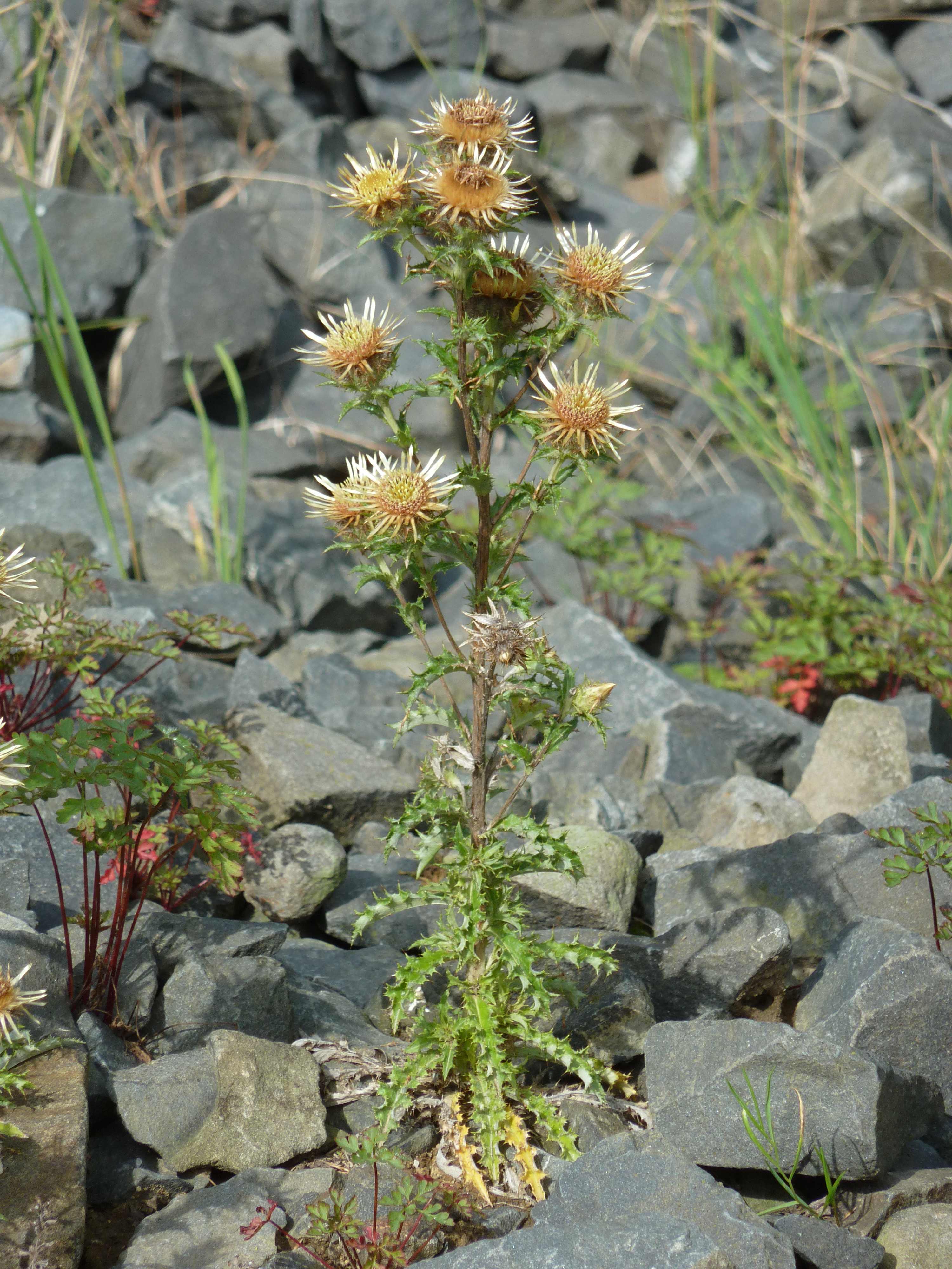 Gemeine Eberwurz (Golddistel) auf dem Kerstlingeröder Feld bei Göttingnen, Südniedersachsen